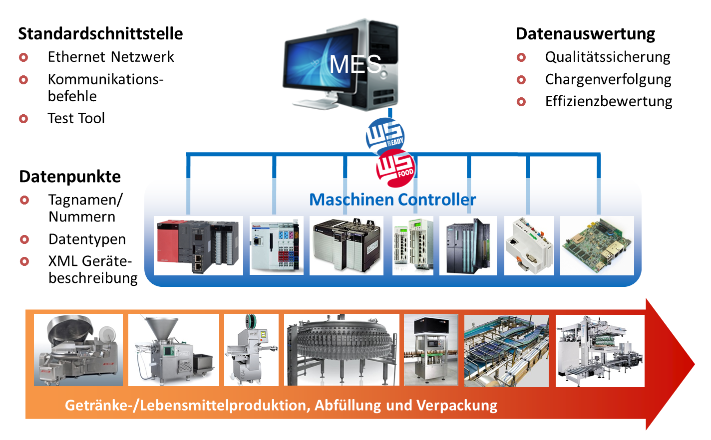 Zeigt die definierten Elemente der Weihenstephaner Standards